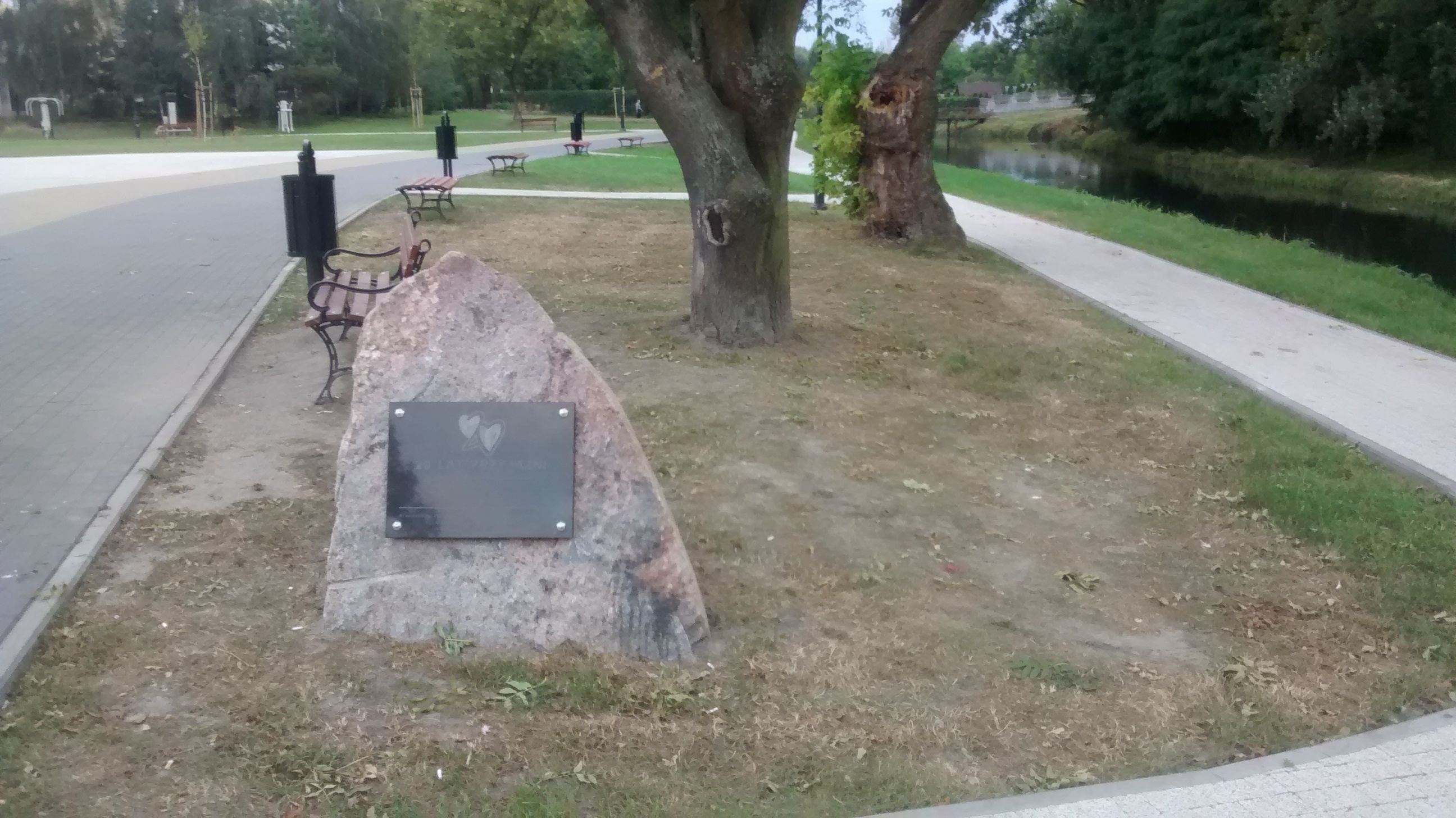 Bulwar Przyjaźni